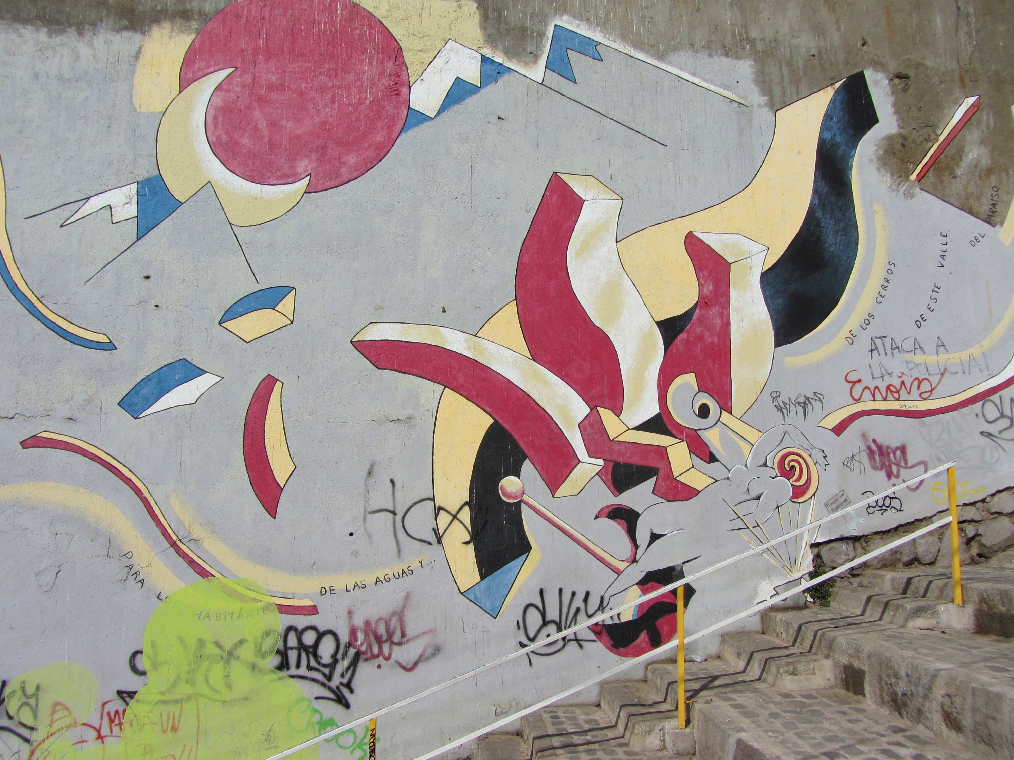 Mural nº11 del Museo a Cielo Abierto de Valparaíso, titulado En la playa de la casa amarilla, pintado por Mario Toral en 1992